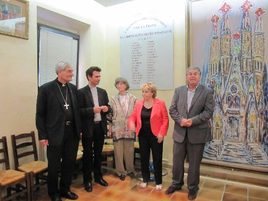 Photo de l'inauguration de l'exposition des oeuvres de Vincent Roux à l'hôtel de ville de Peynier le 29 Juillet 2011